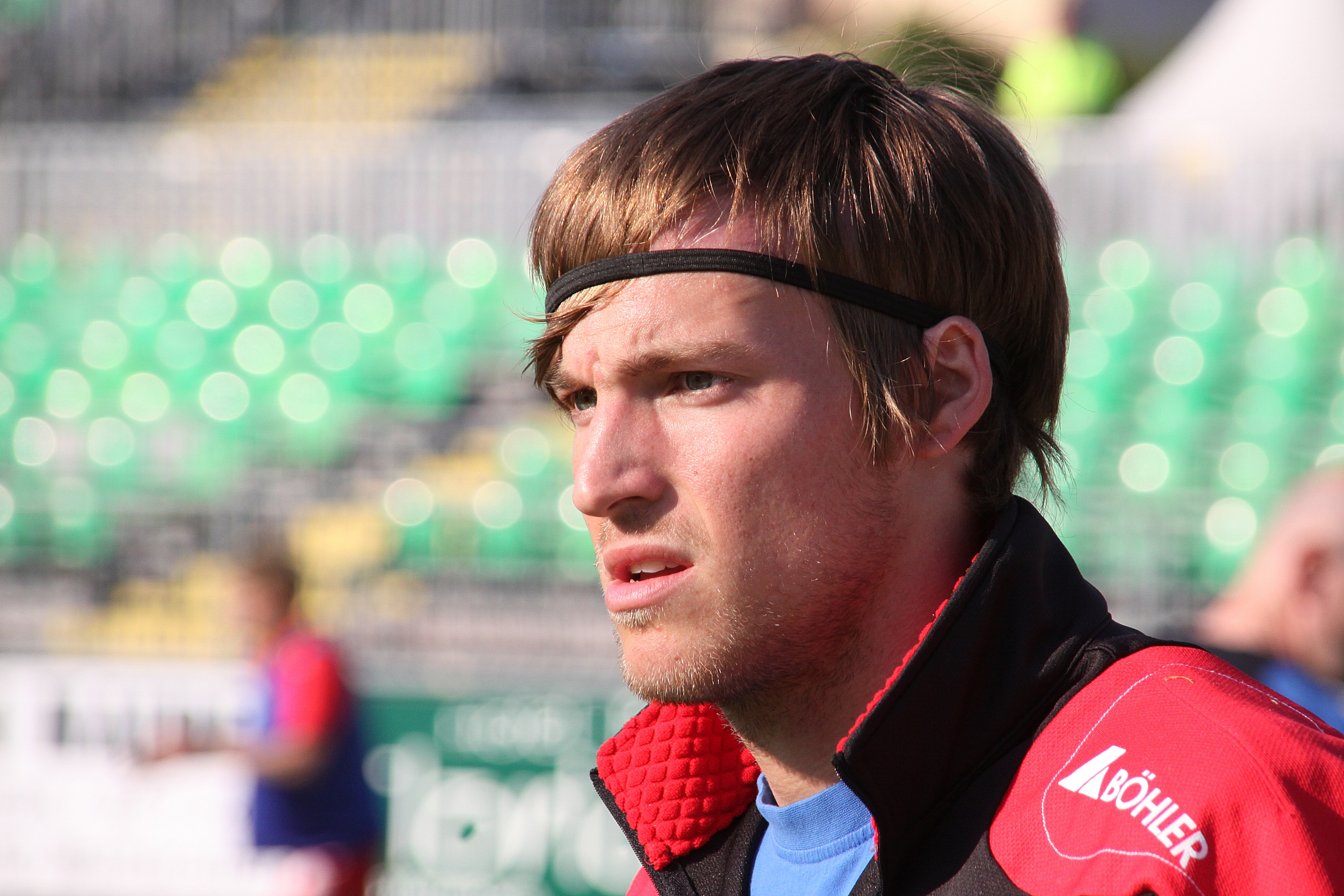 Patrick Kostner – Kapfenberger SV (quer)